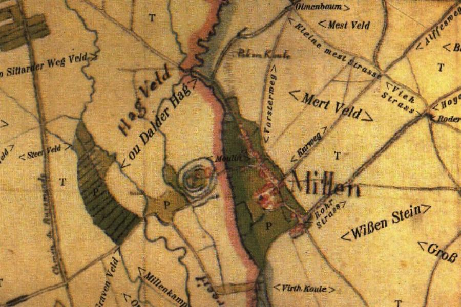 Kartenaufnahme der Rheinlande 1804/05